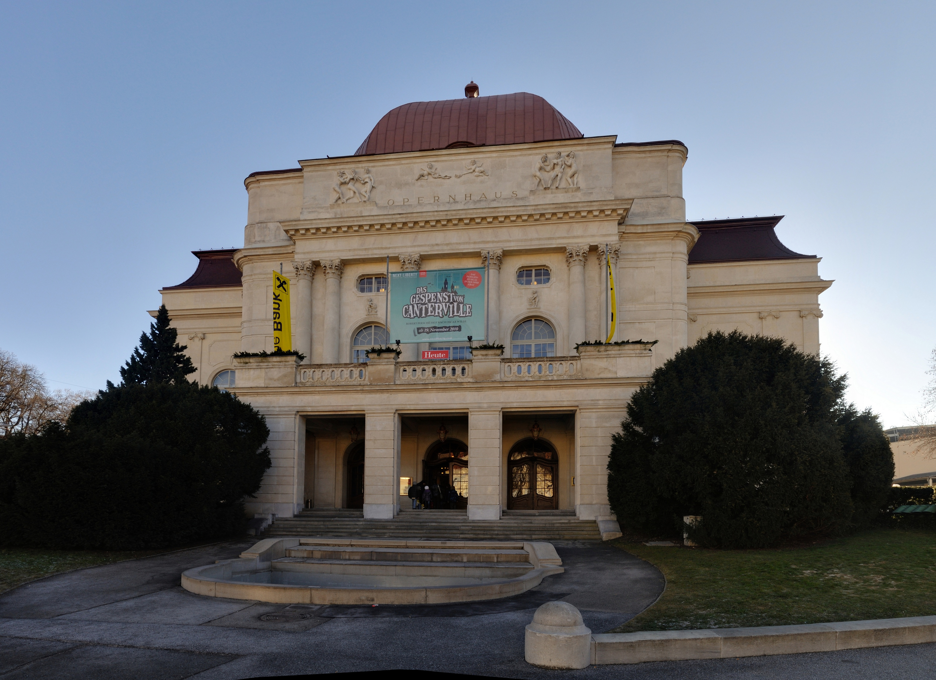 Graz: Opernhaus